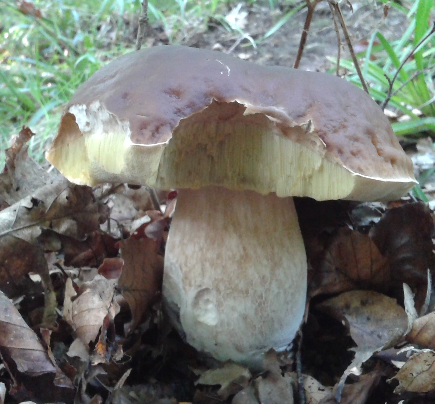 bolet